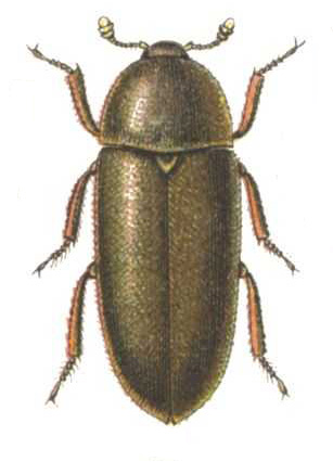 Dermestes maculatus DeGeer, 1774